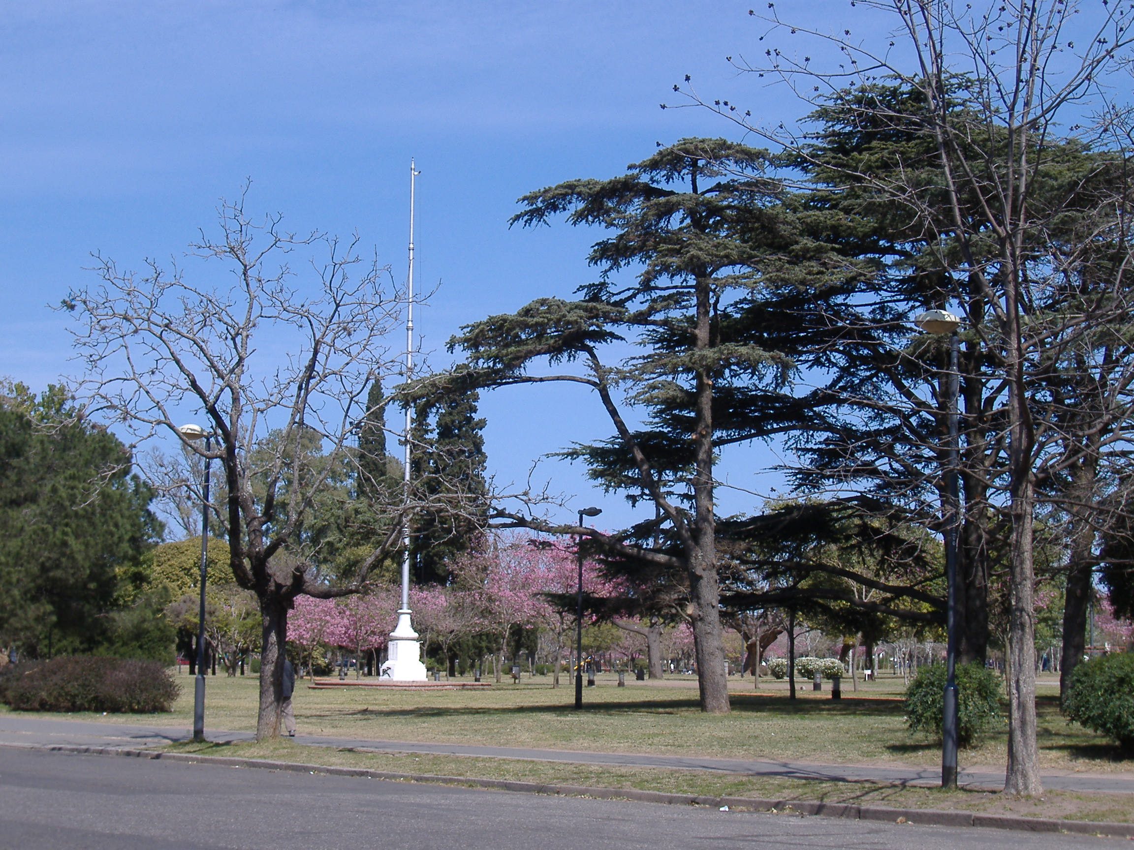 Parque Urquiza, an urban park in Rosario, Argentina.